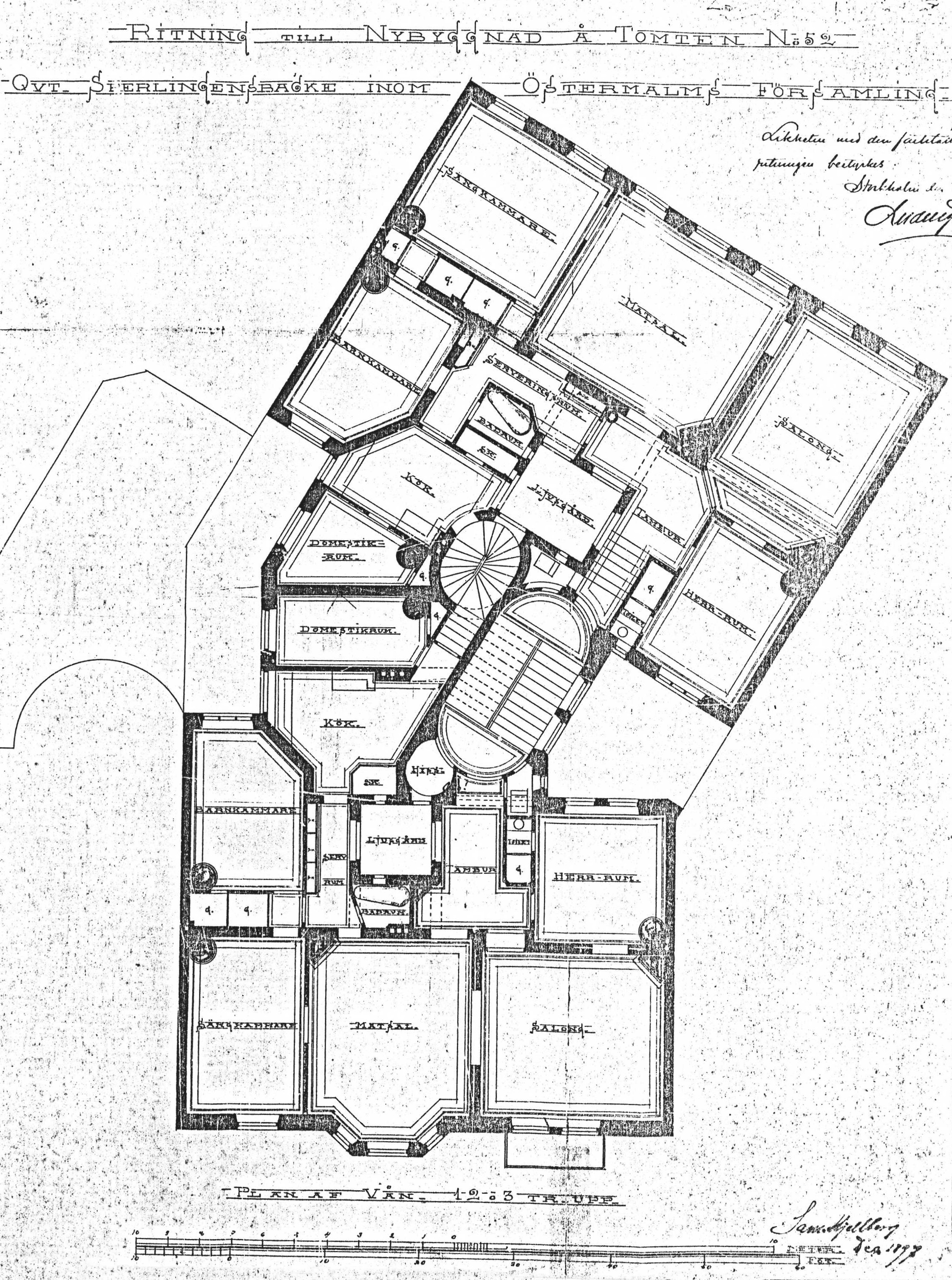 Birger Jarlsgatan 22, planritning, vån. 1, 2 och 3